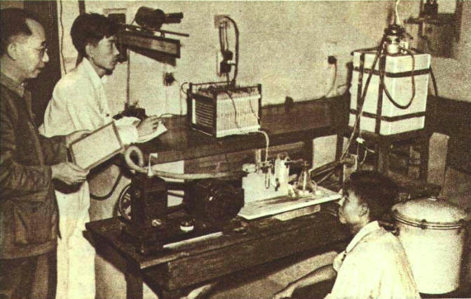 1953年余瑞璜教授研究X光射线管